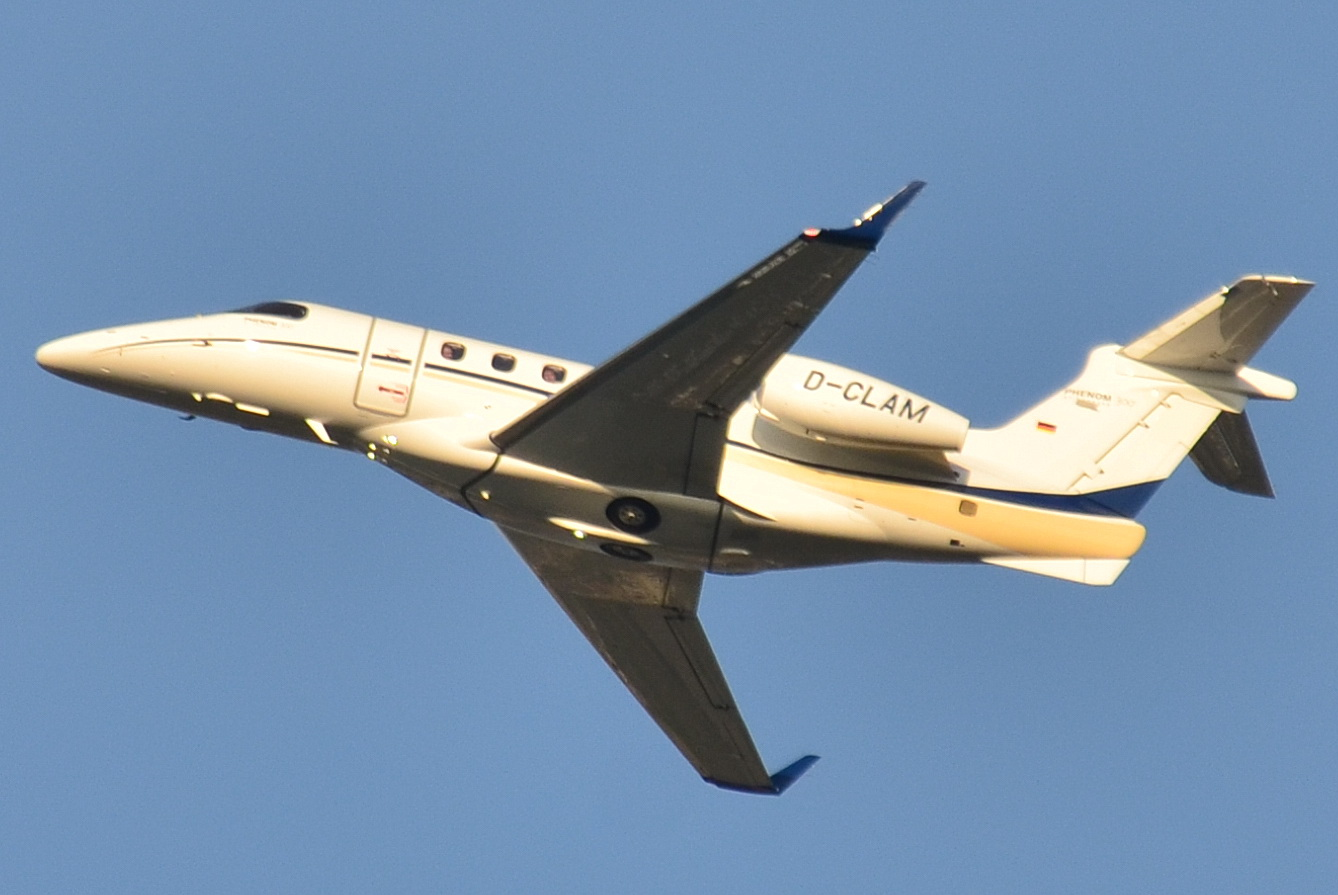 Photo prise à l'aéroport de Toulouse-Blagnac (LFBO) en France. Picture take at Toulouse-Blagnac Airport (LFBO) in France.